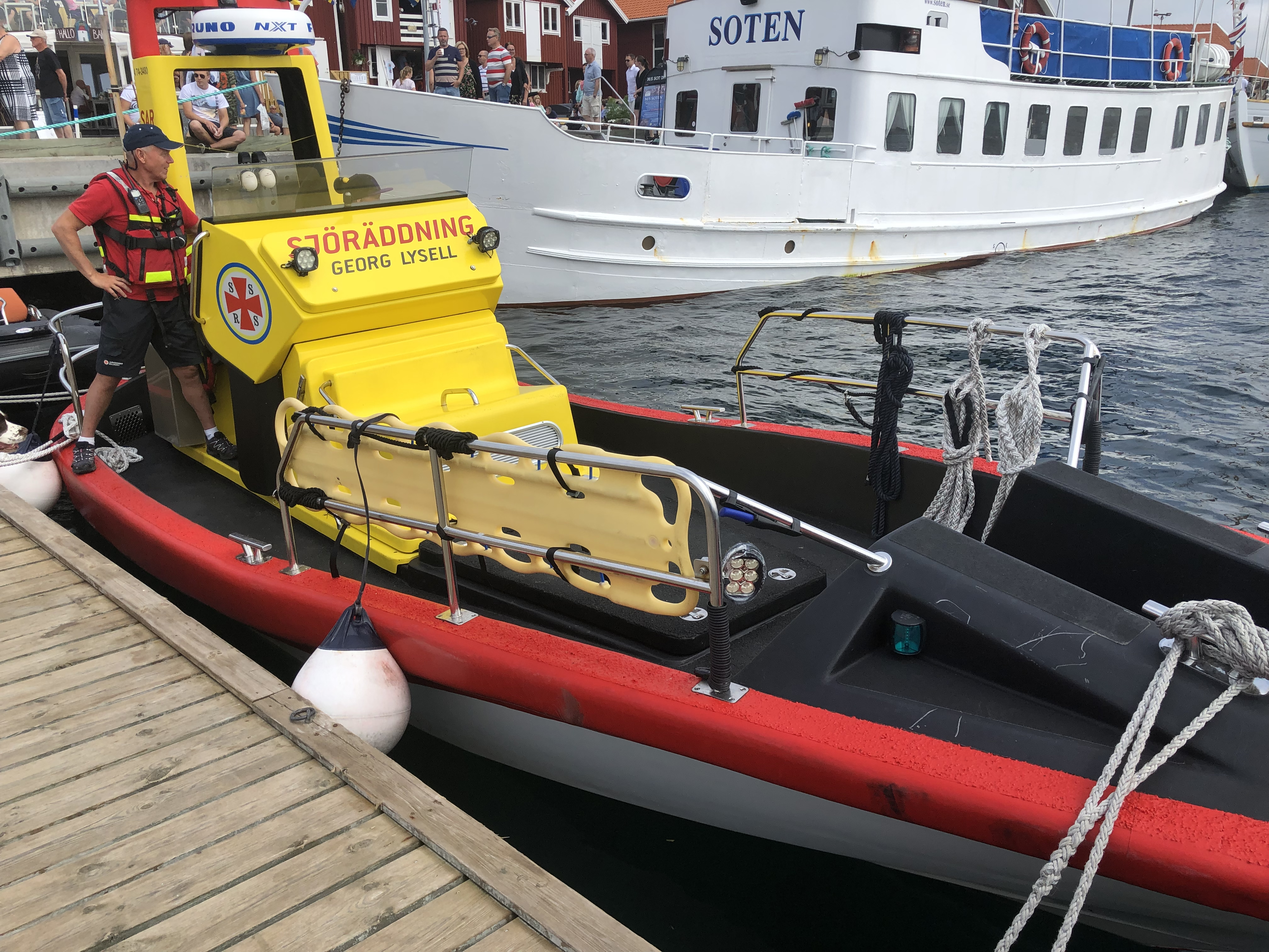 Rescue Georg Lysell på Smögen under Sjöräddningens dag. Foto: Johan Rosén